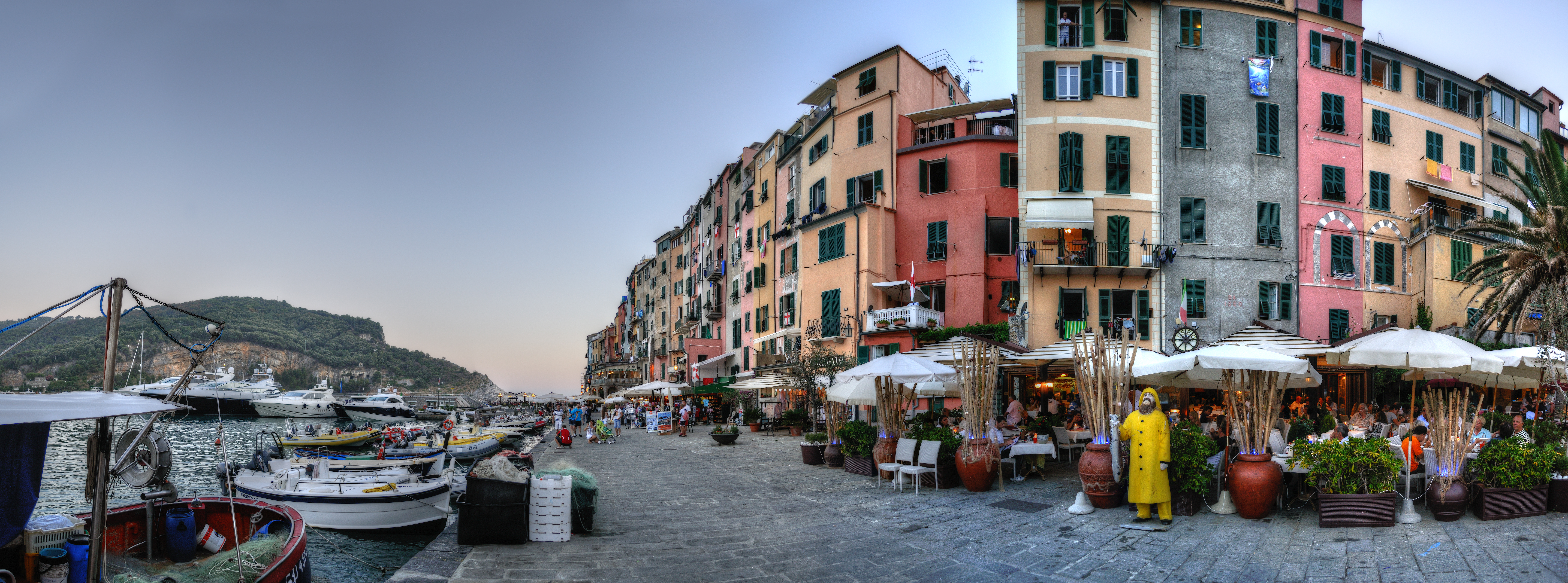 Portovenere - Portovenere (SP) Italia - 29 Luglio 2012